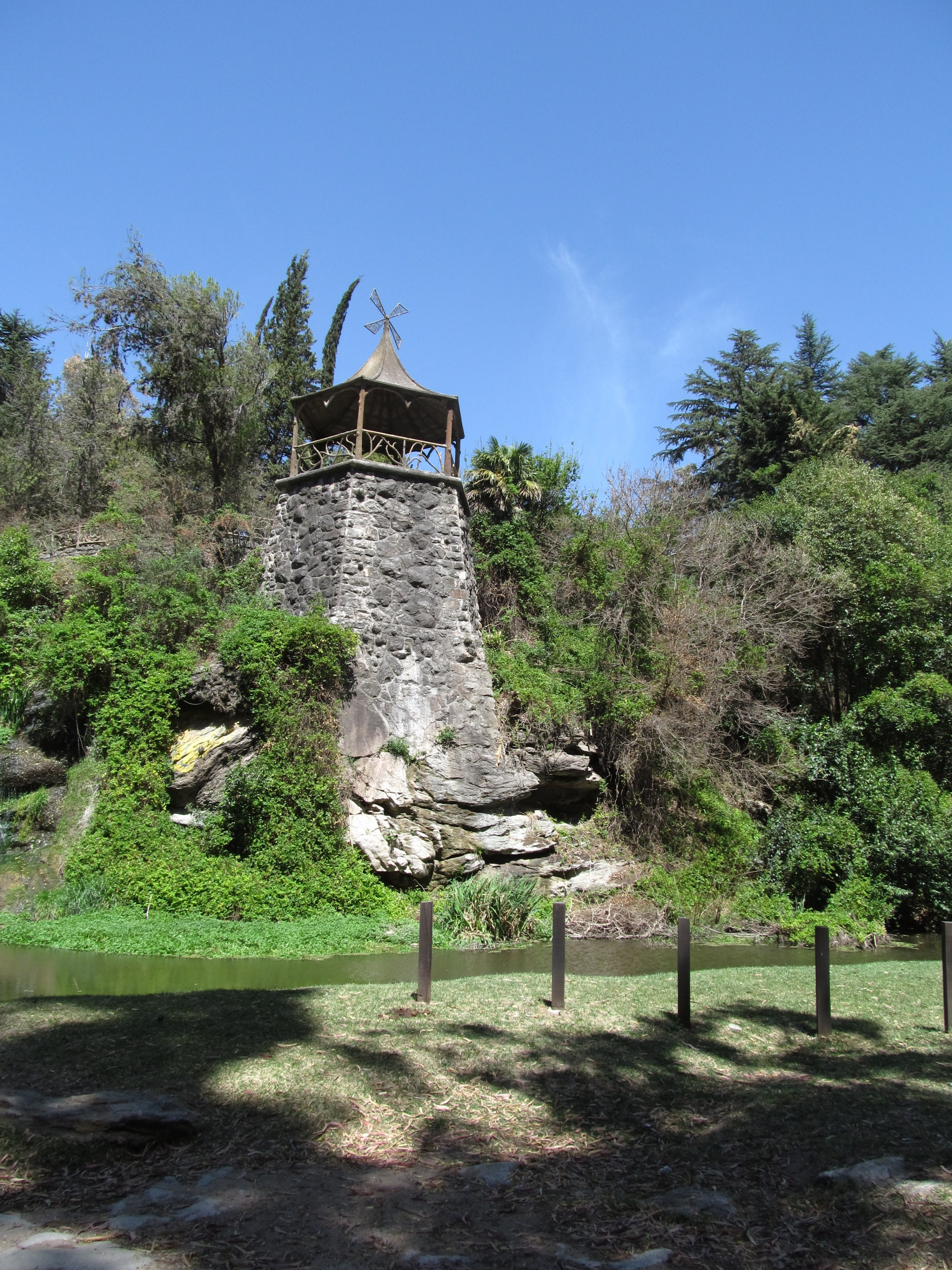 Molino de Thea, Villa Giardino, Córdoba, Argentina. (año 2013)